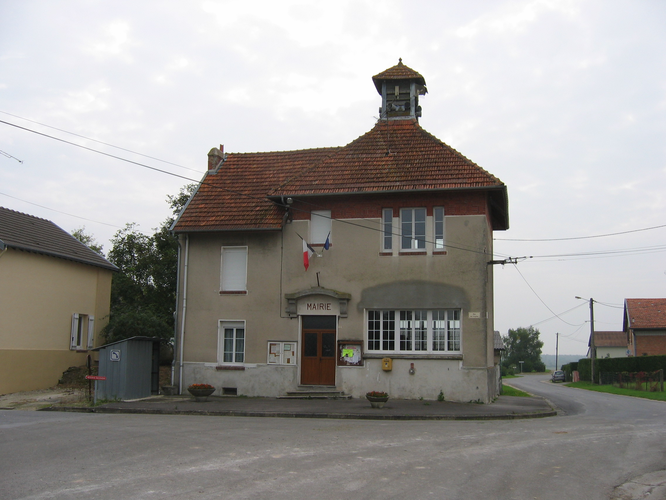 Mairie de Bouconville, Ardennes, France